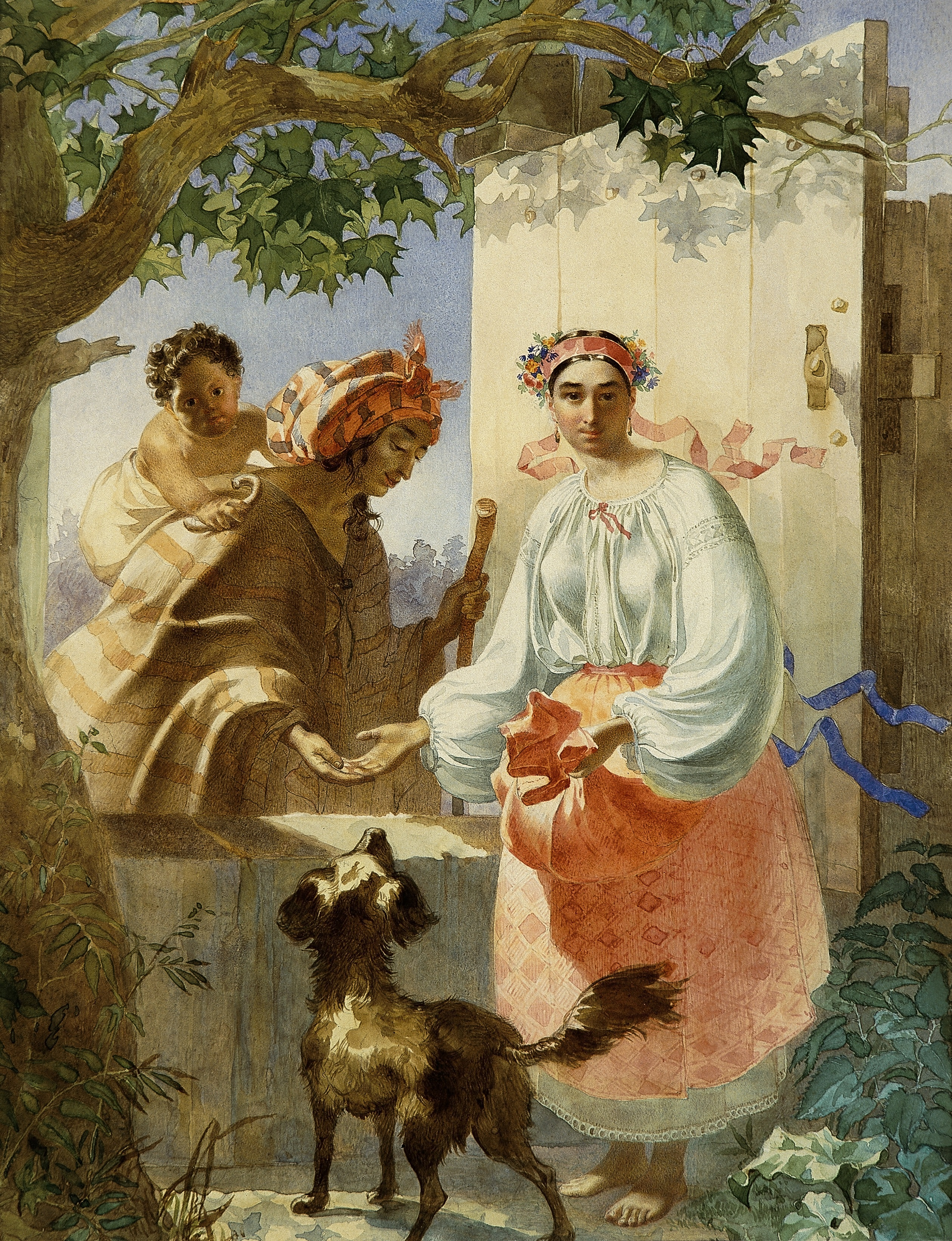 Т. Г. Шевченко. «Циганка-ворожка». 1841. Брістольський папір, акварель. 26,5 × 20,7 см. Національний музей Тараса Шевченка, Київ, Україна.